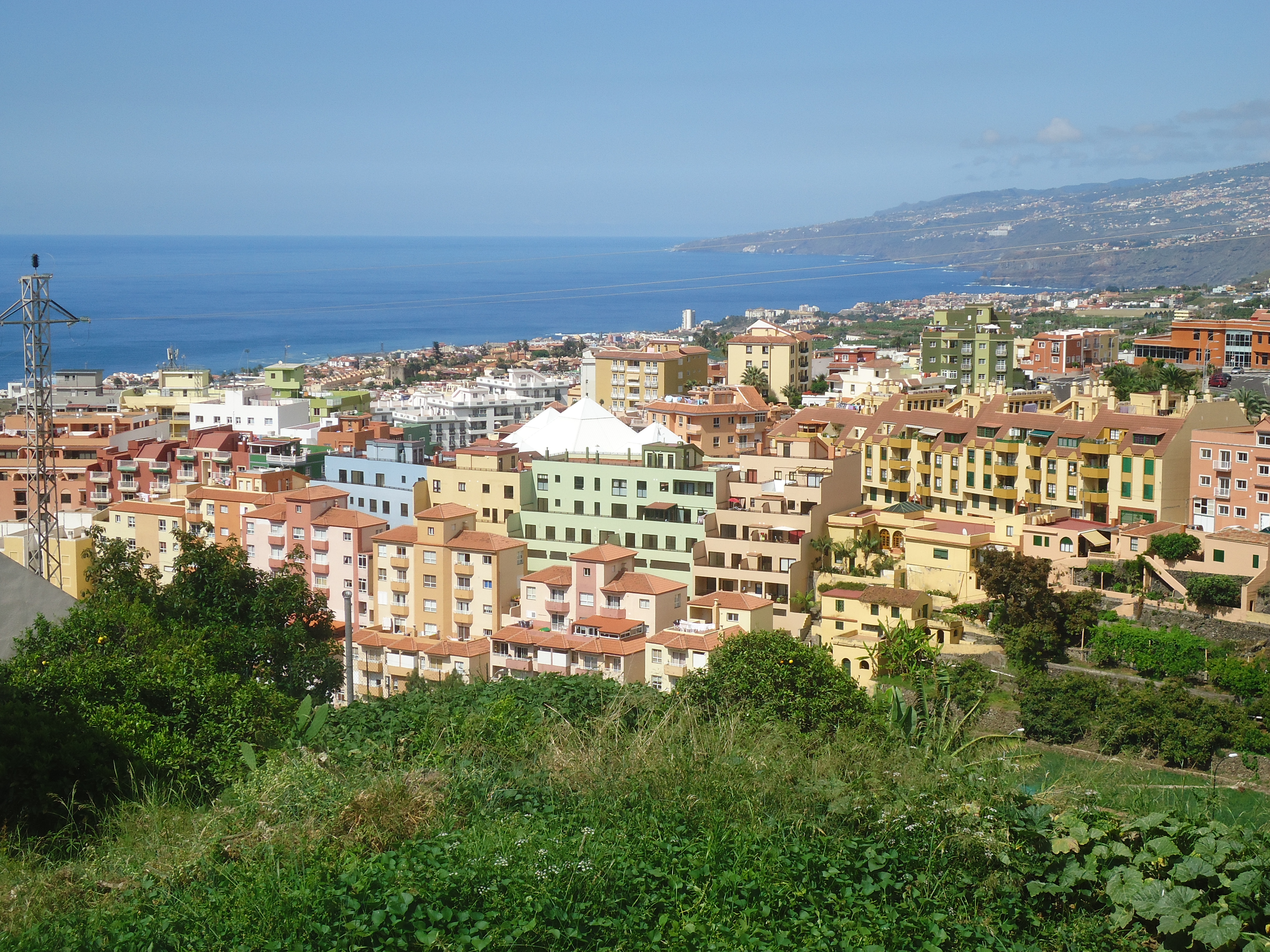 Vista de San Agustín desde el Cementerio de San Francisco.